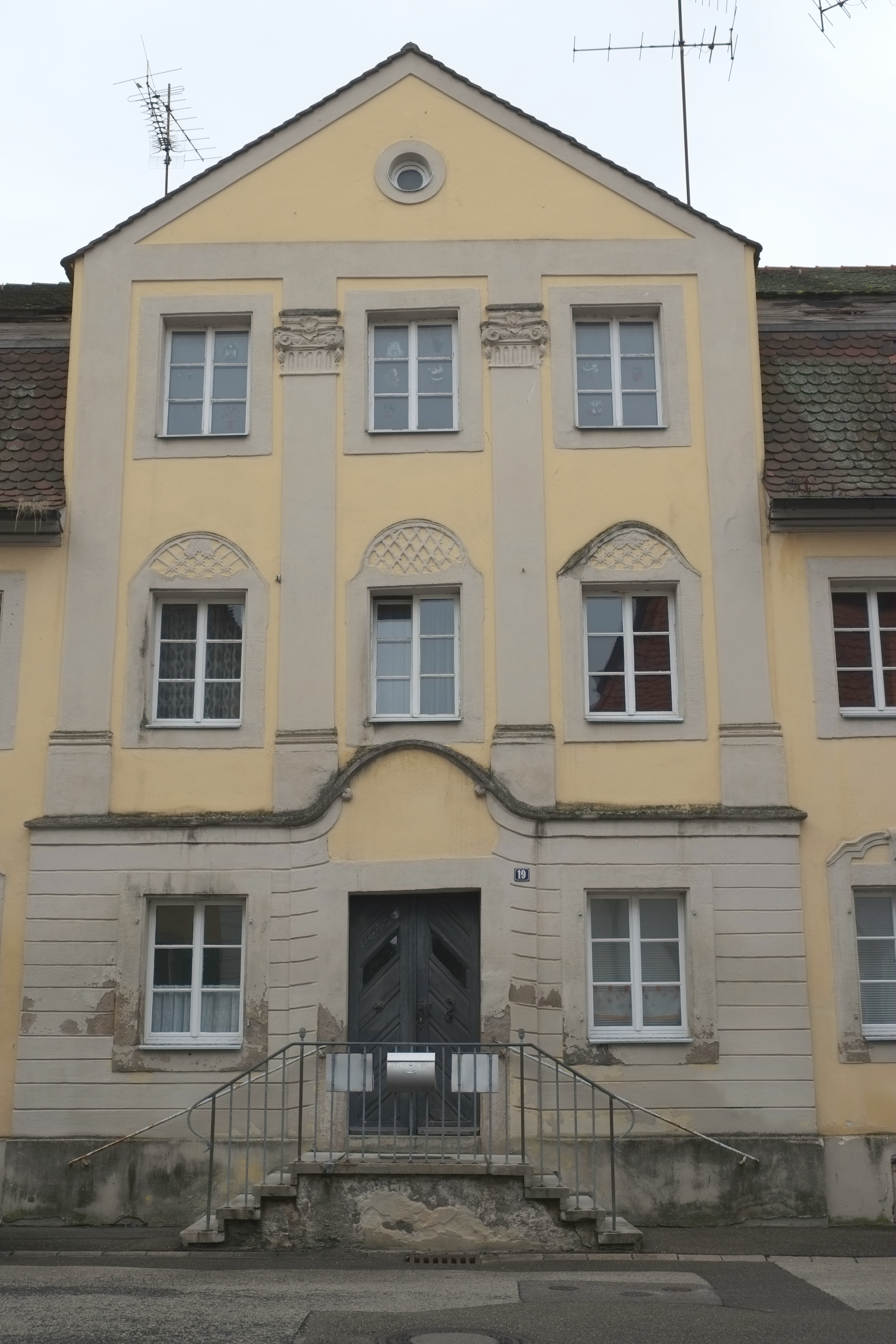 Haus Neue Gasse 19 in Ellingen im Landkreis Weißenburg-Gunzenhausen (Bayern)